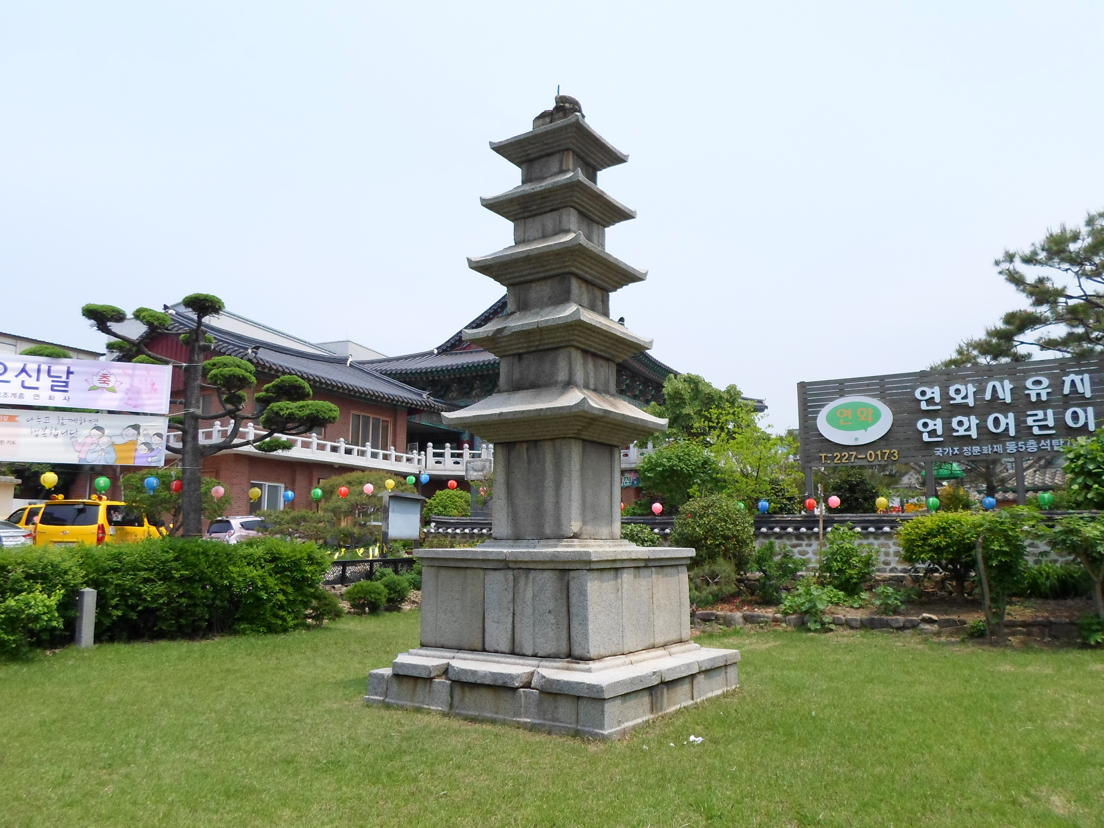 대한민국 보물 제110호 광주 지산동 오층석탑(光州芝山洞五層石塔).